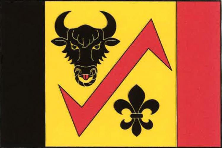 vlajka, Přestavlky, okres Chrudim